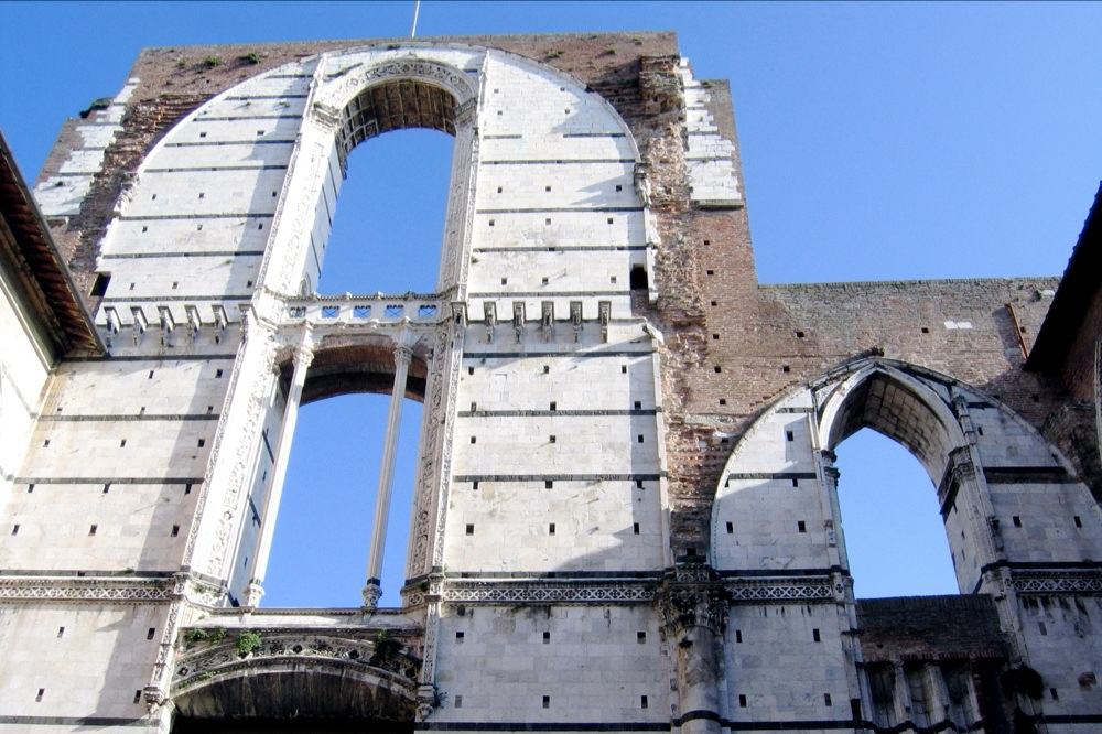 Mura del mai completato ampiamento del Duomo, Siena, Italia